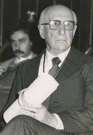 Lluís Santaló investit doctor Honoris Causa per la Universitat Autònoma de Barcelona a l'Ajuntament de Girona.